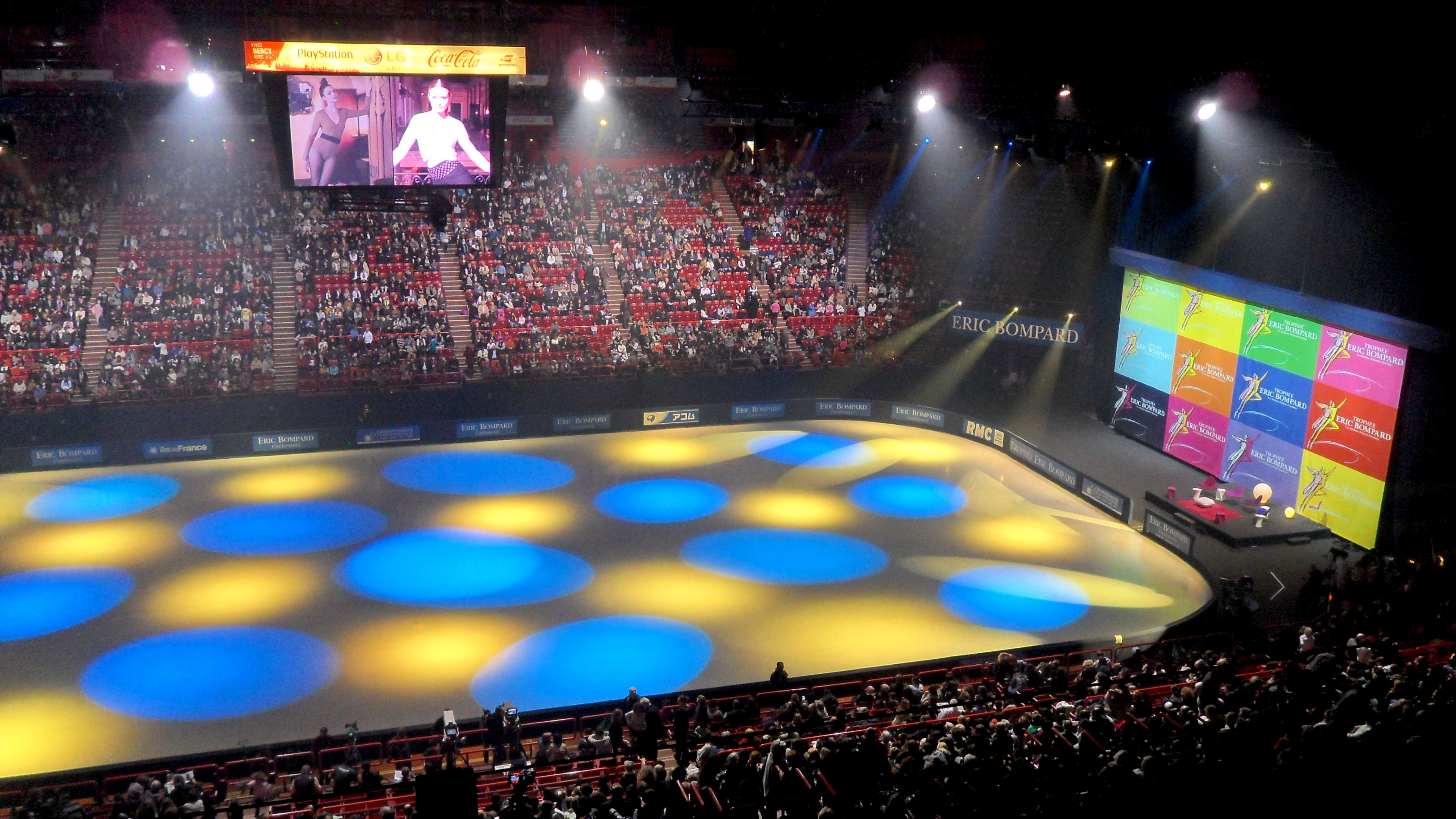 Trophée Eric Bompard 2011 au Palais Omnisport de Paris-Bercy